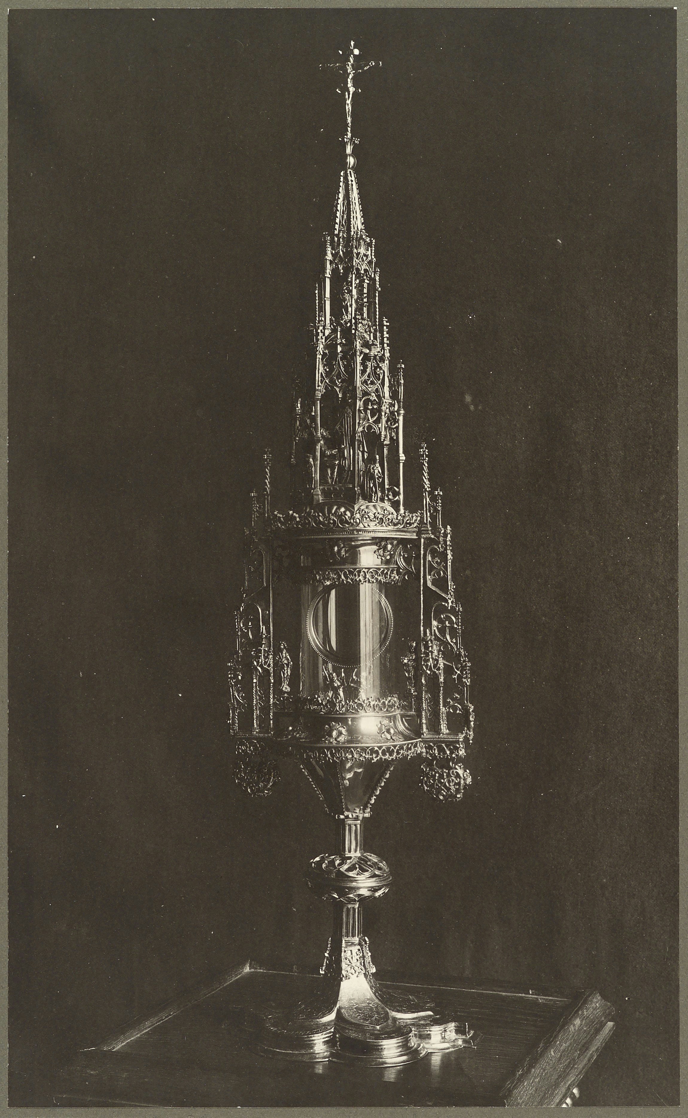 Gesticht van Liefde: Monstrans (opmerking: Bijschrift: Monstrans Zusters Pausgang "Gesticht v. Liefde")